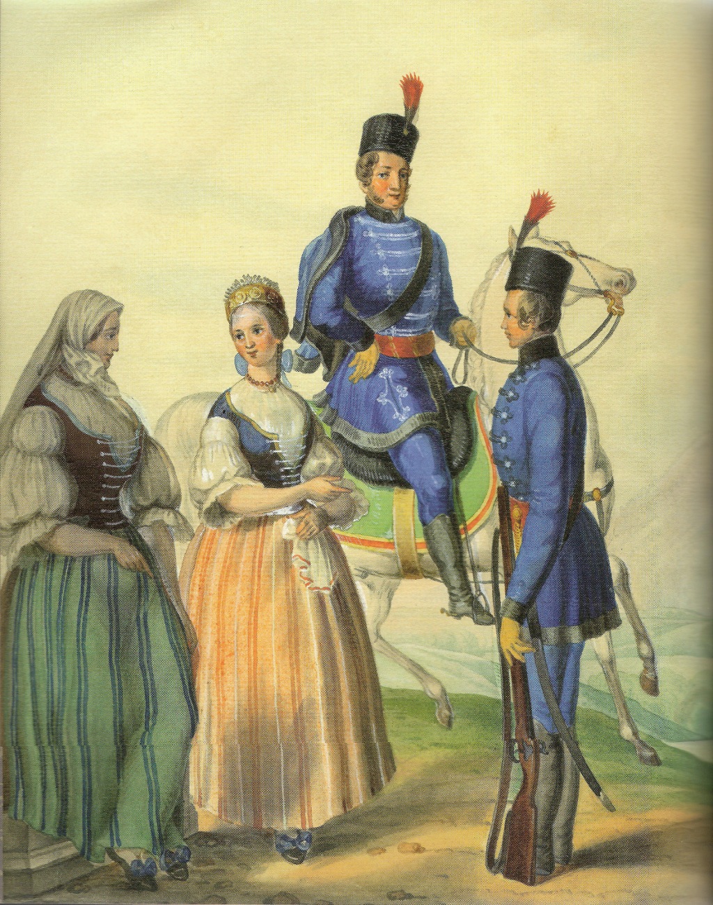 Akwarela Henryka Jastrzembskiego przedstawiająca Jacków Jabłonkowskich (mieszczan z miasta Jabłonkowa z 1846 roku.